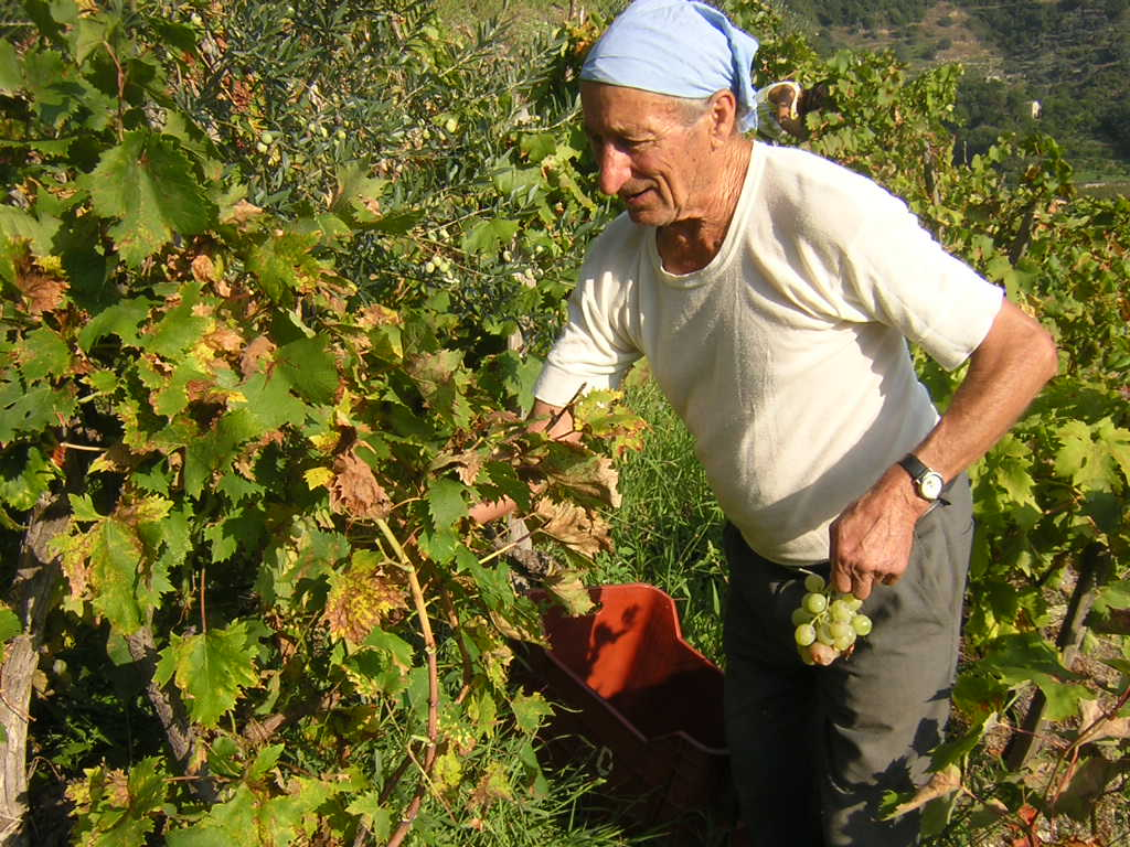 vendemmia bivongi 08/10/2004 foto cannarozzo